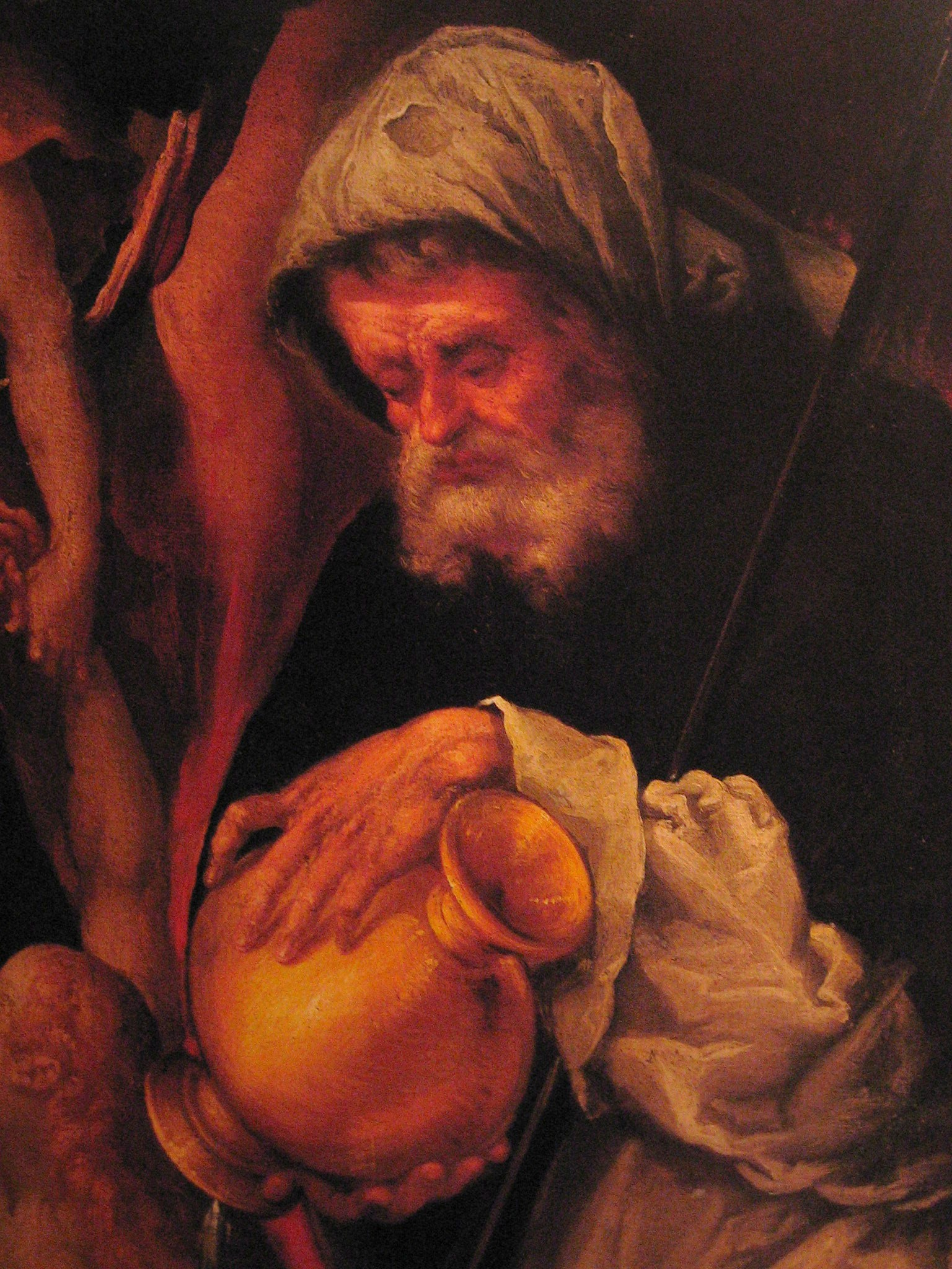 detail